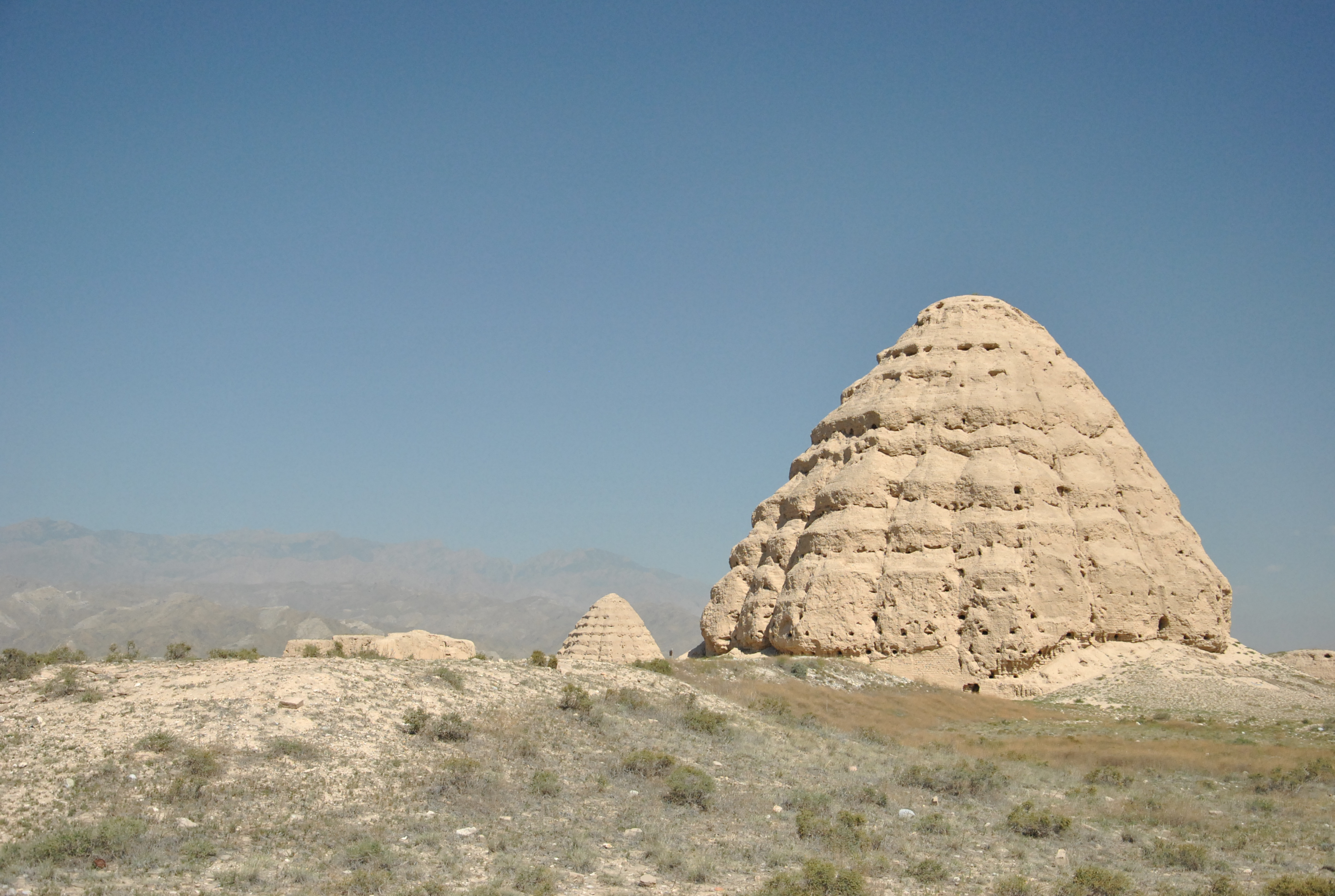 中文（中国大陆）: 西夏一号陵陵塔，后为二号陵陵塔